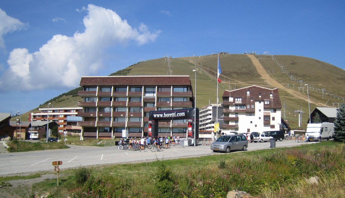 L'Alpe d'Huez L'Alpe d'Huez, Isère, France. The arrival line for the Tour de France.